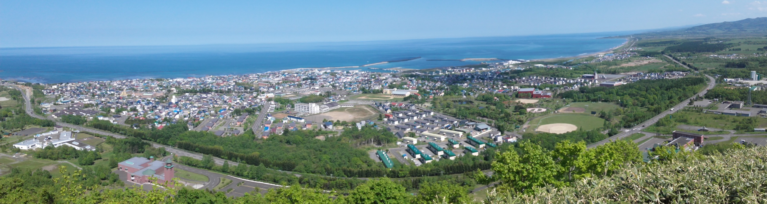 Esashi